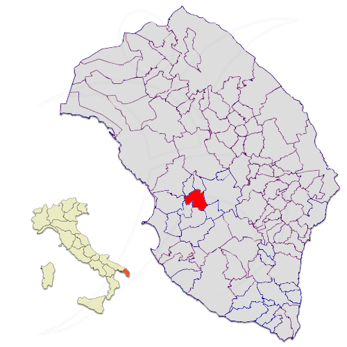 Il territorio del comune di Neviano in provincia di Lecce